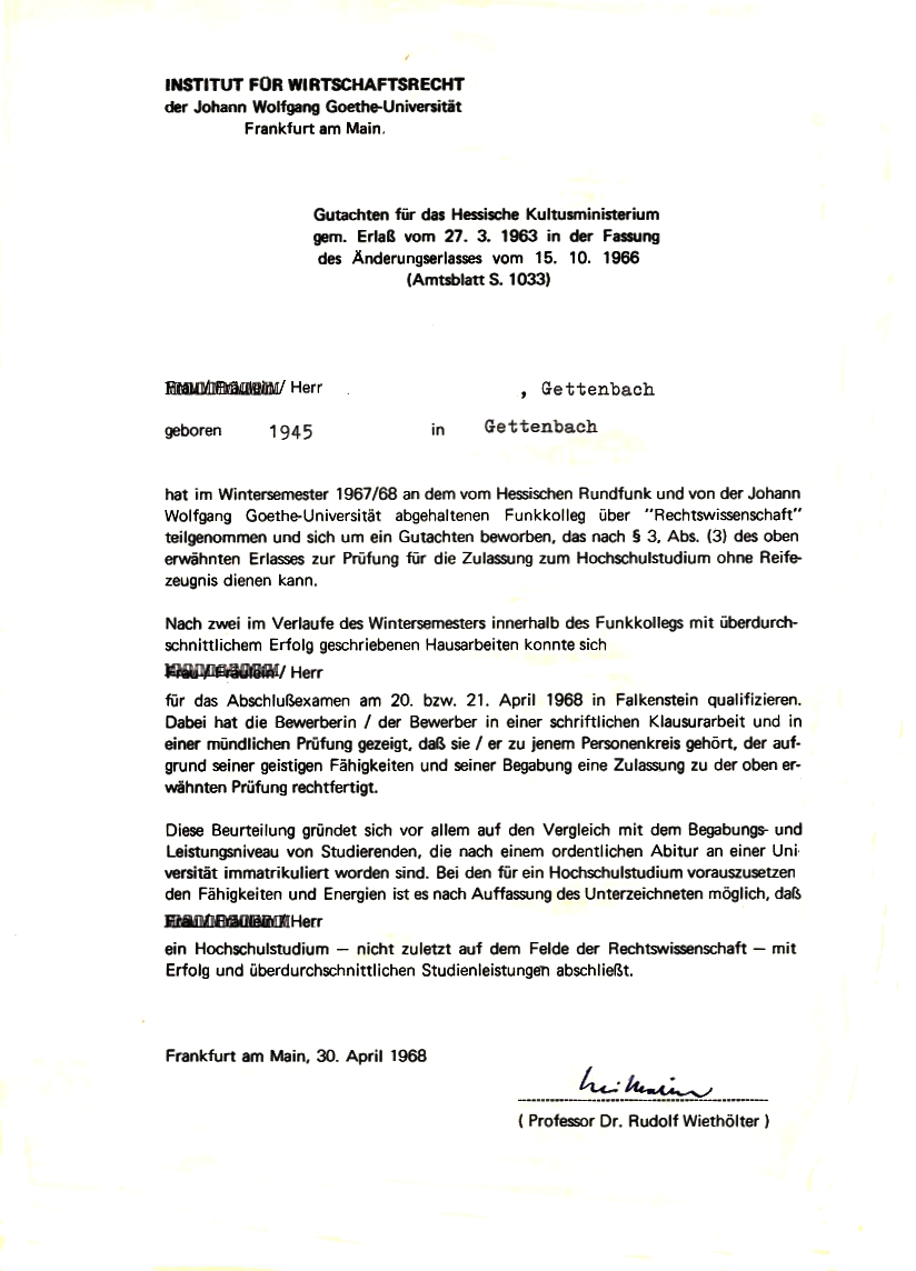 Gutachten für die Zulassung zur Begabtenprüfung (Hochschulstudium ohne Reifezeugnis) durch den Hessischen Kultusminster (1968)